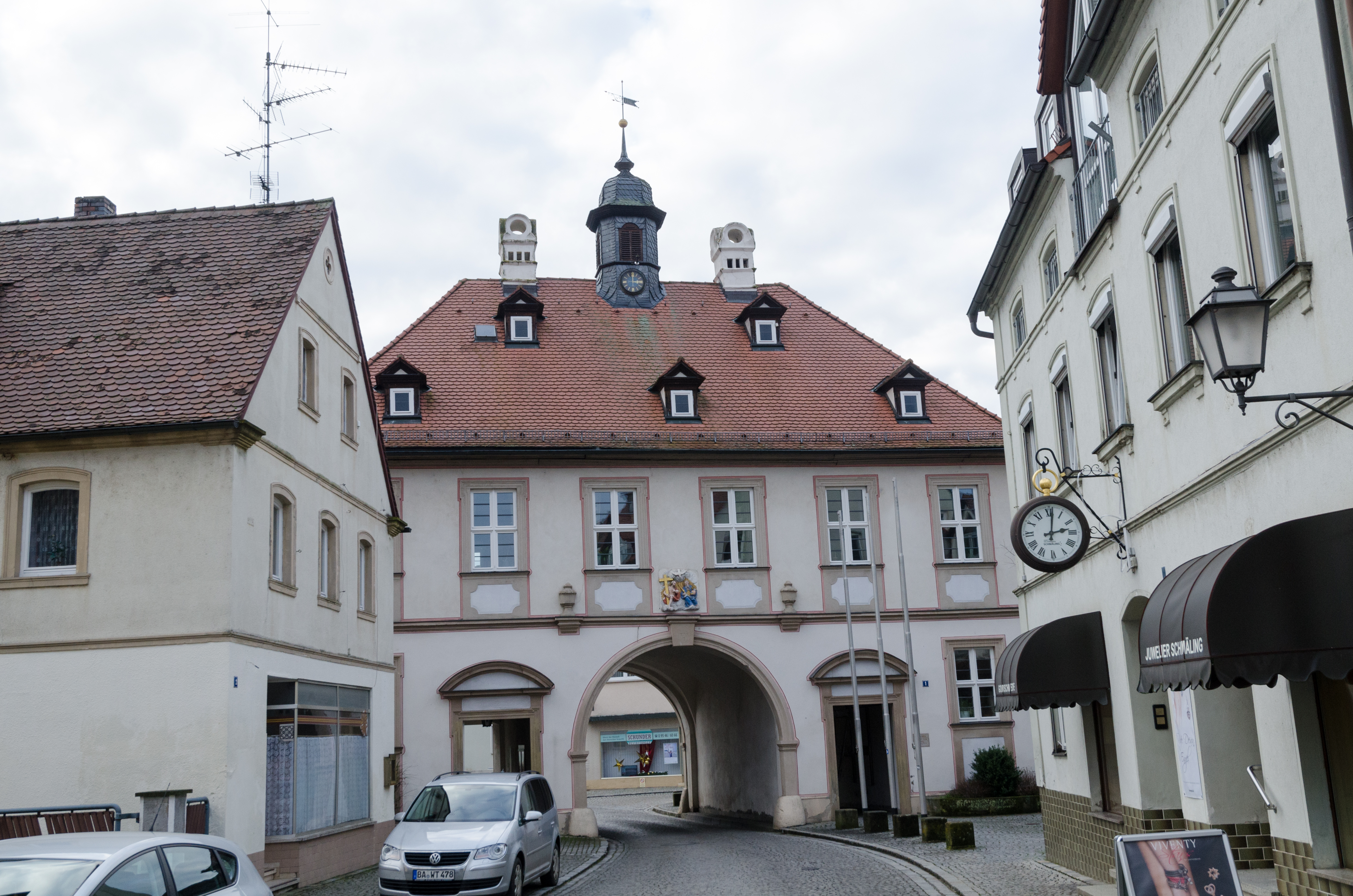 Burgebrach, Hauptstraße 1